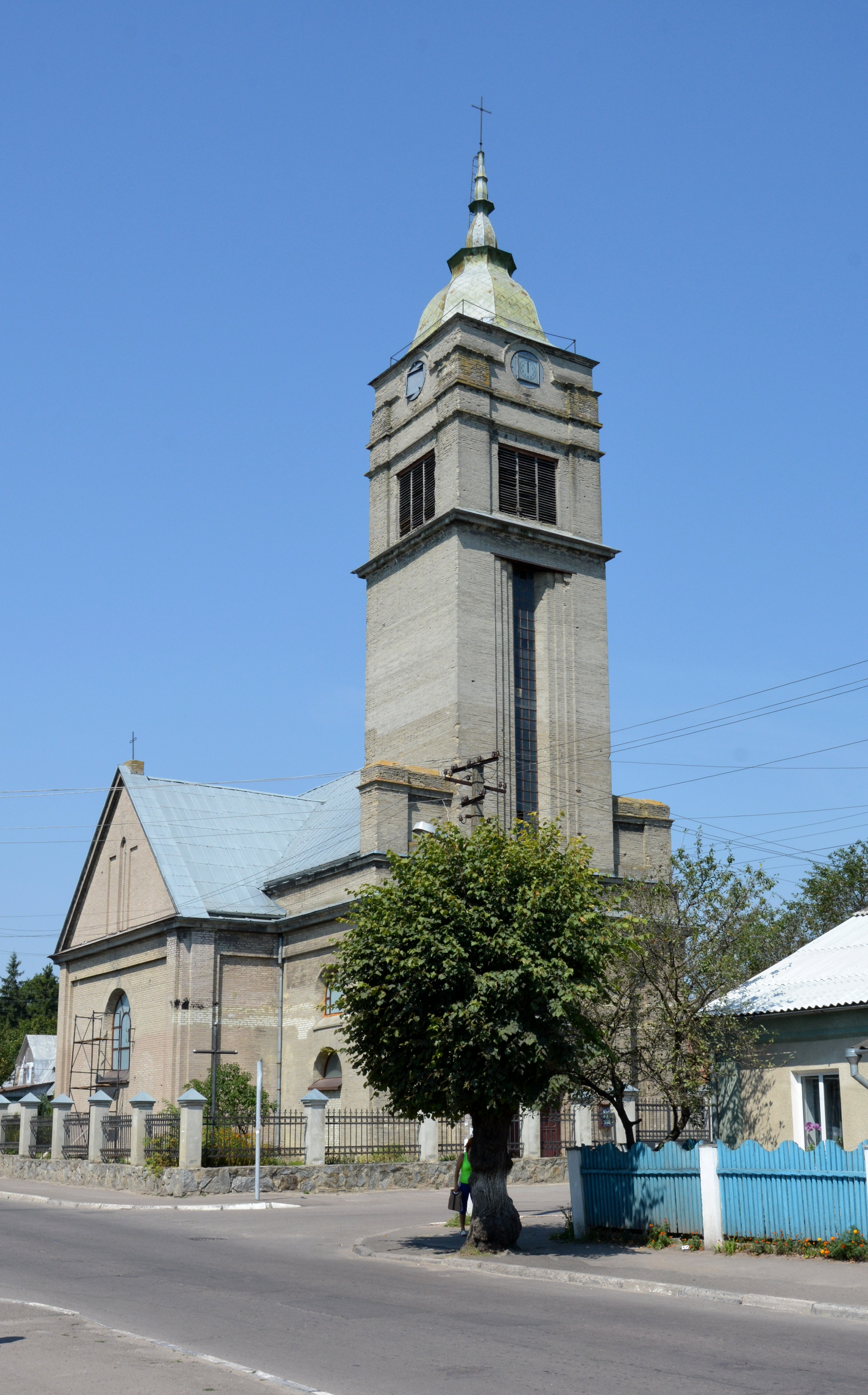 Костел (мур.), Здолбунів, вул.Пушкіна